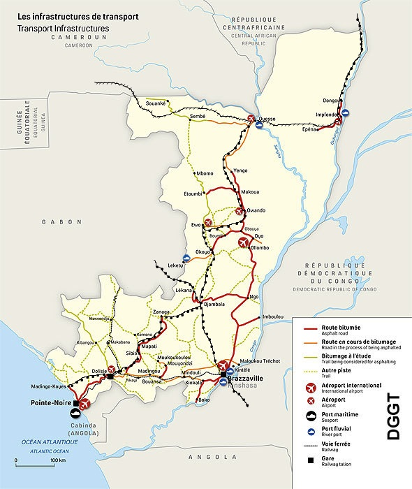 Projet future du CFCO